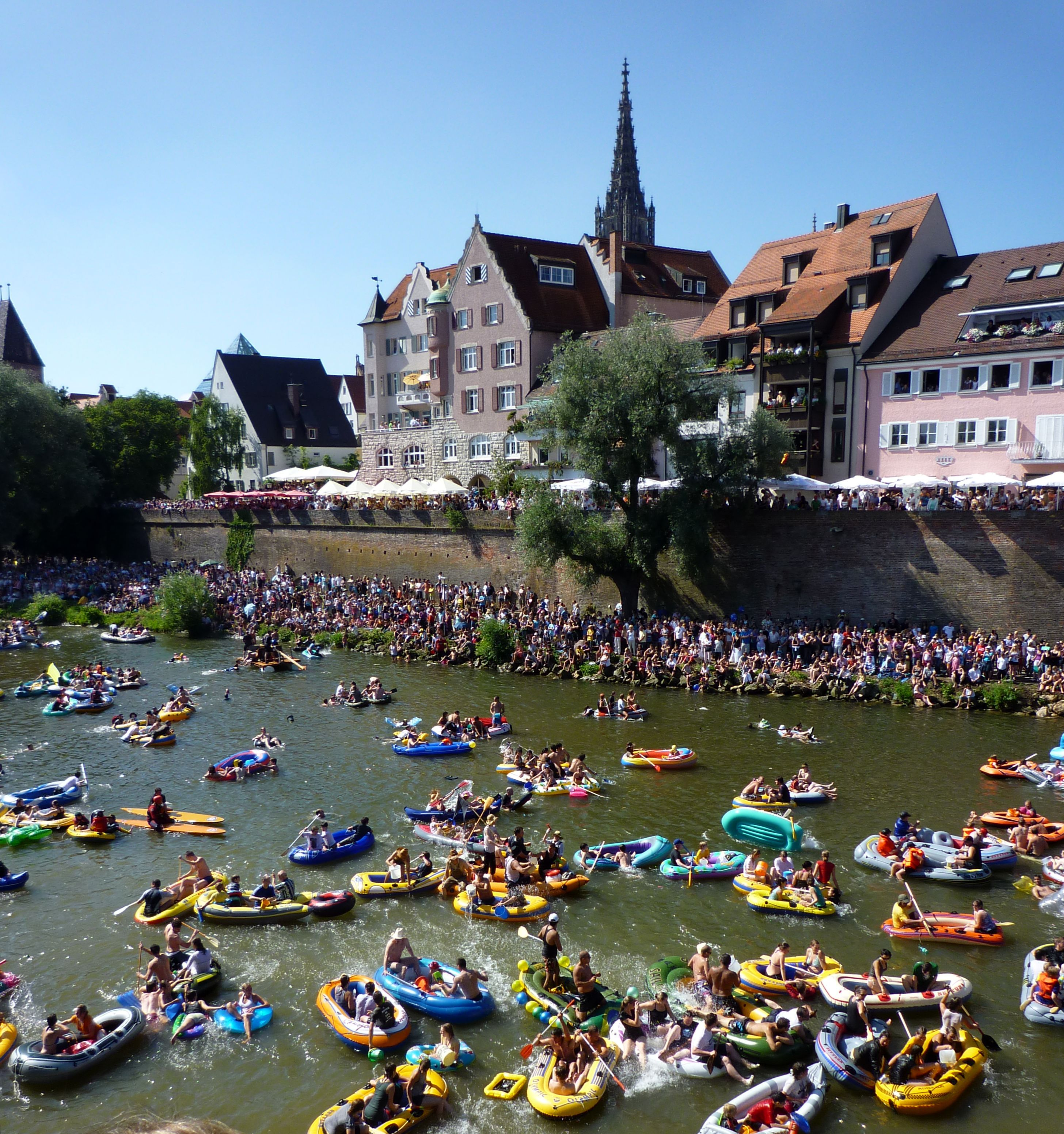 Ulm - Schwörmontagsfestzug -Nabada- auf der Donau_05